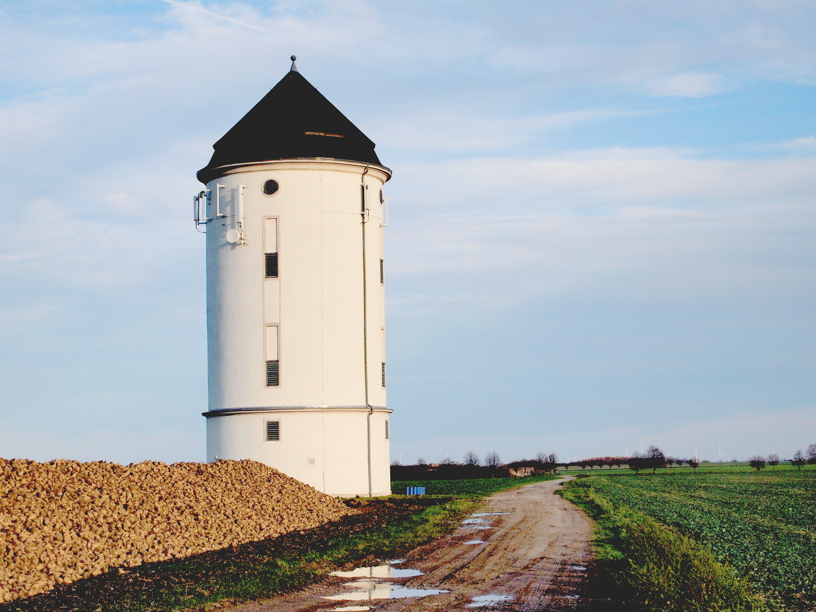 Der 1935 erbaute Wasserturm von Crölp-Löbschütz hat ein Fassungsvermögen von 200 m³ Trinkwasser. Bearbeitete Dateiversion.